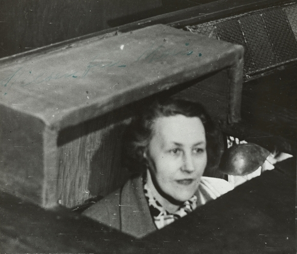 Nationaltheatret, interiør, scene, sufflørkasse, kvinne, sufflør.